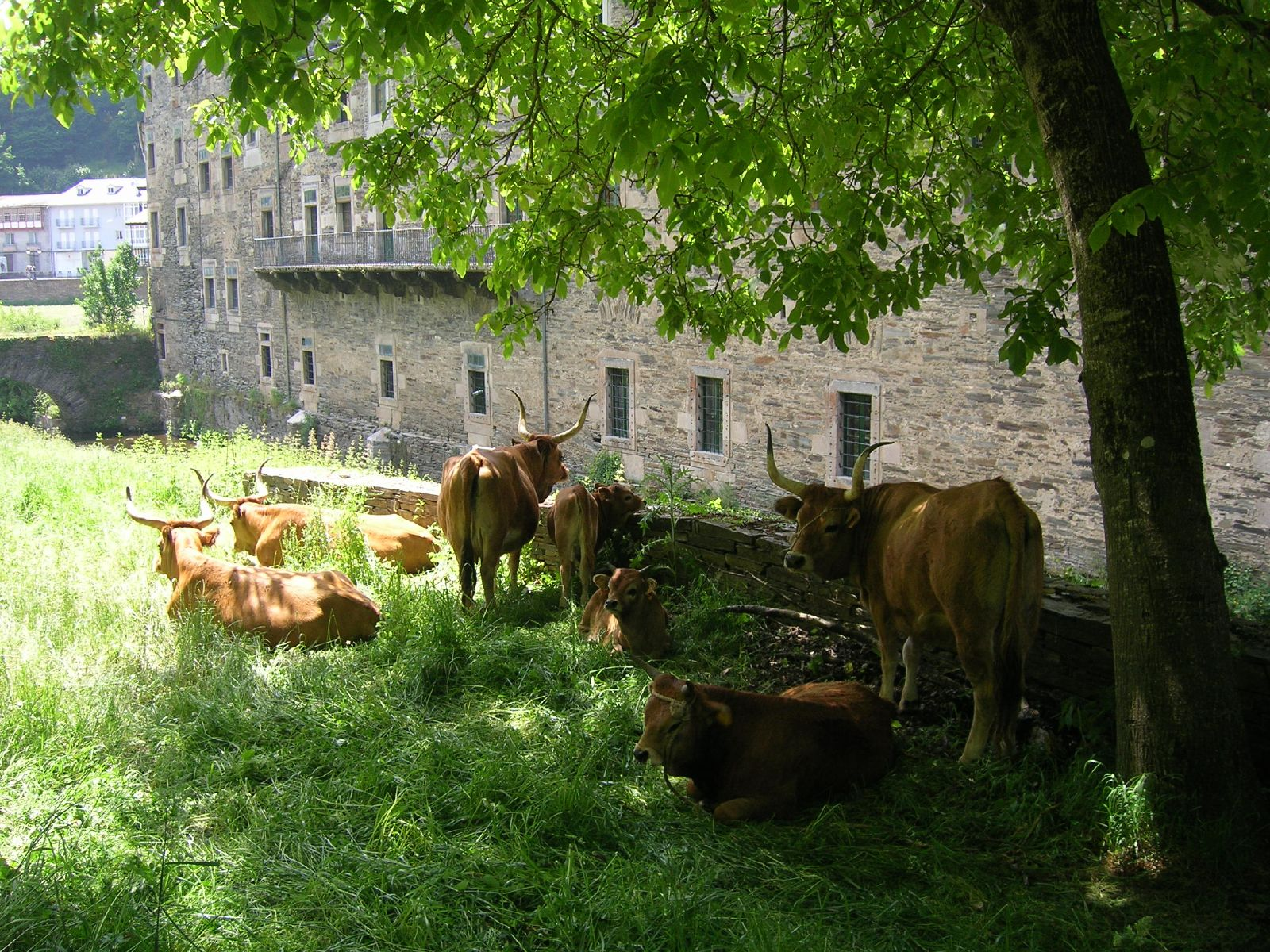 Vaca Cachena en Samos